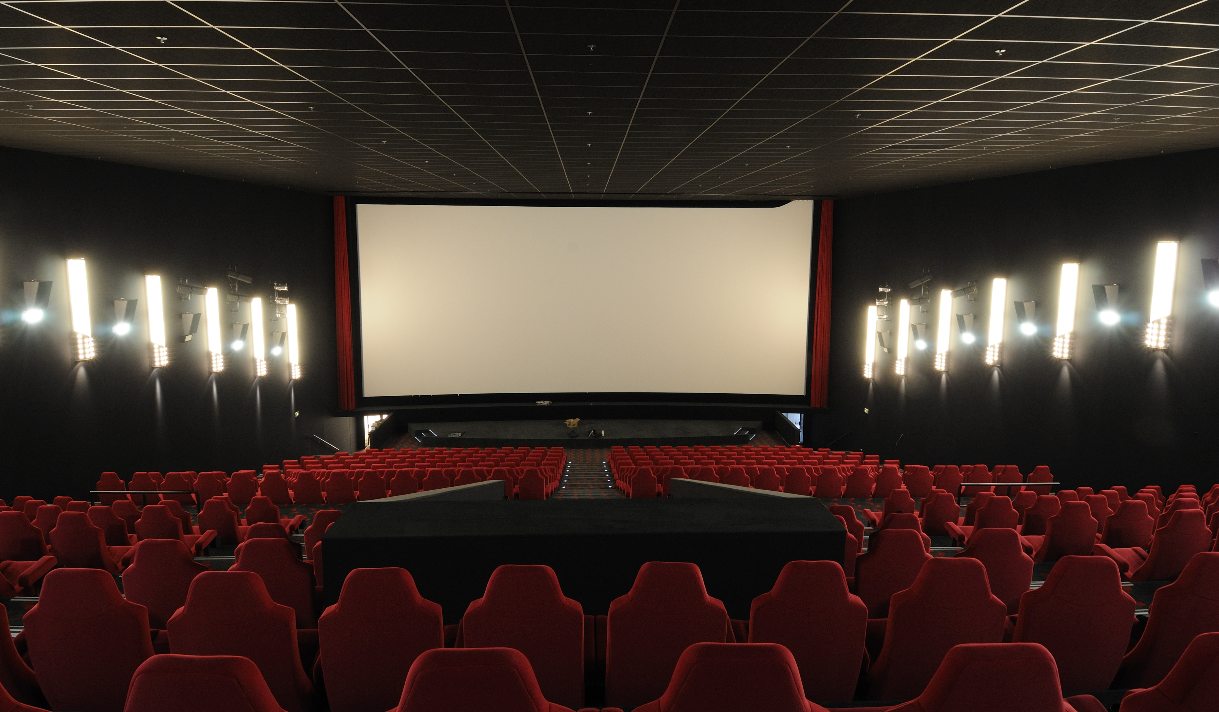 CineBelval De grousse Sall